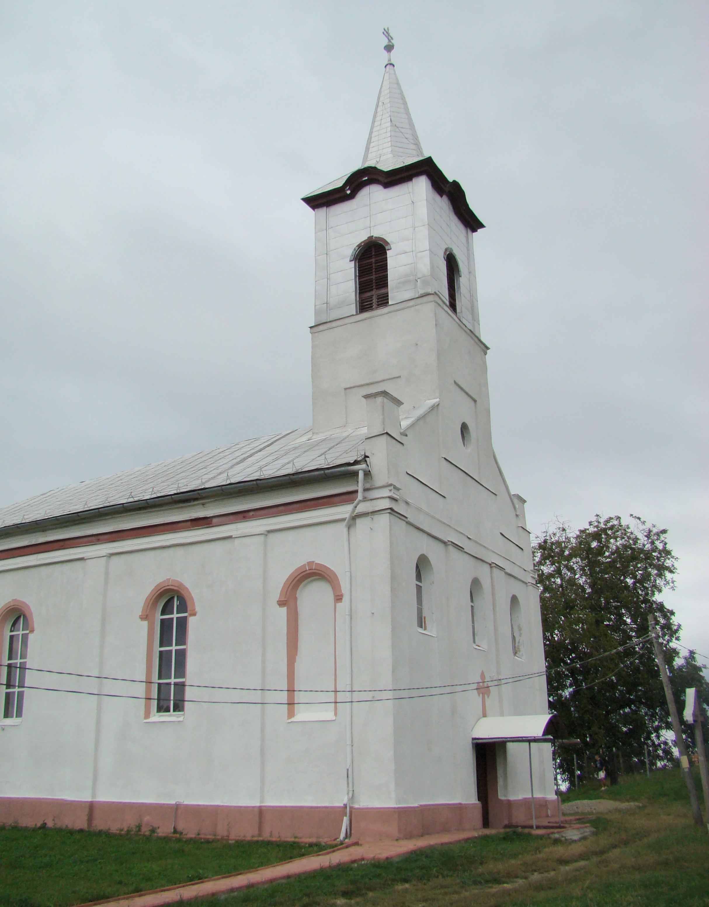 Biserica greco-catolică din Aiton, județul Cluj